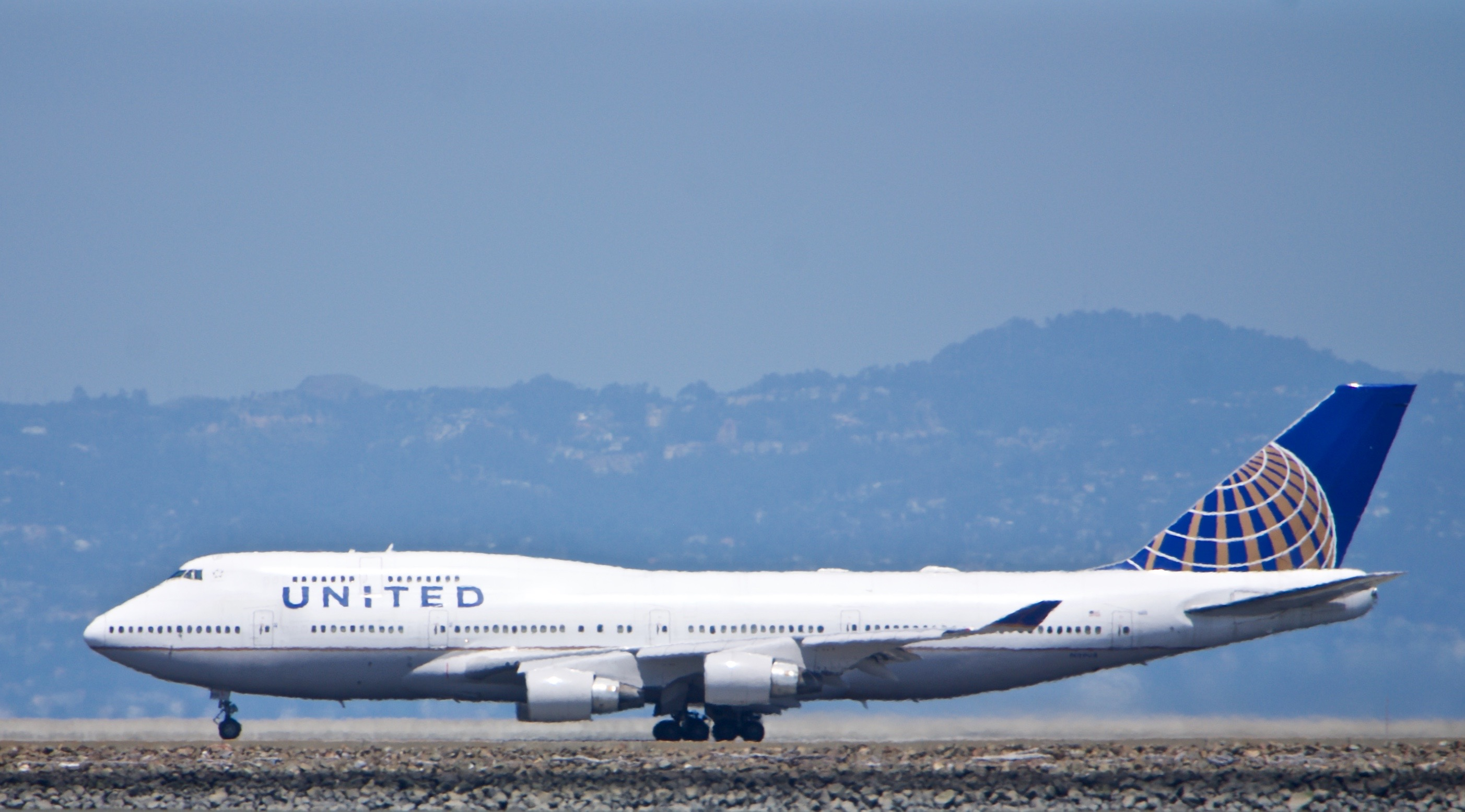 DSC_0490 (1)